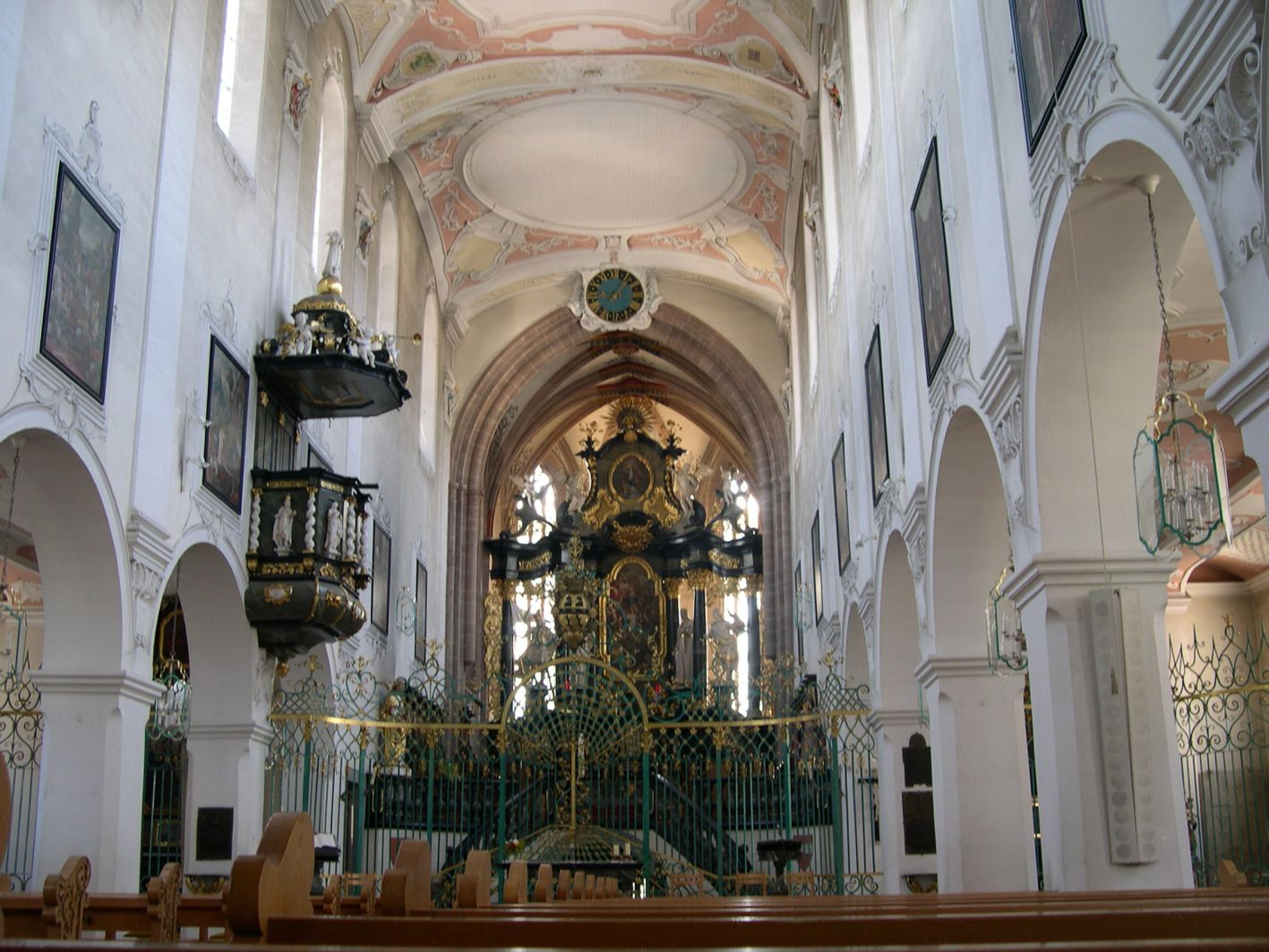 Barocker Innenraum des Verenmünsters in Zurzach.